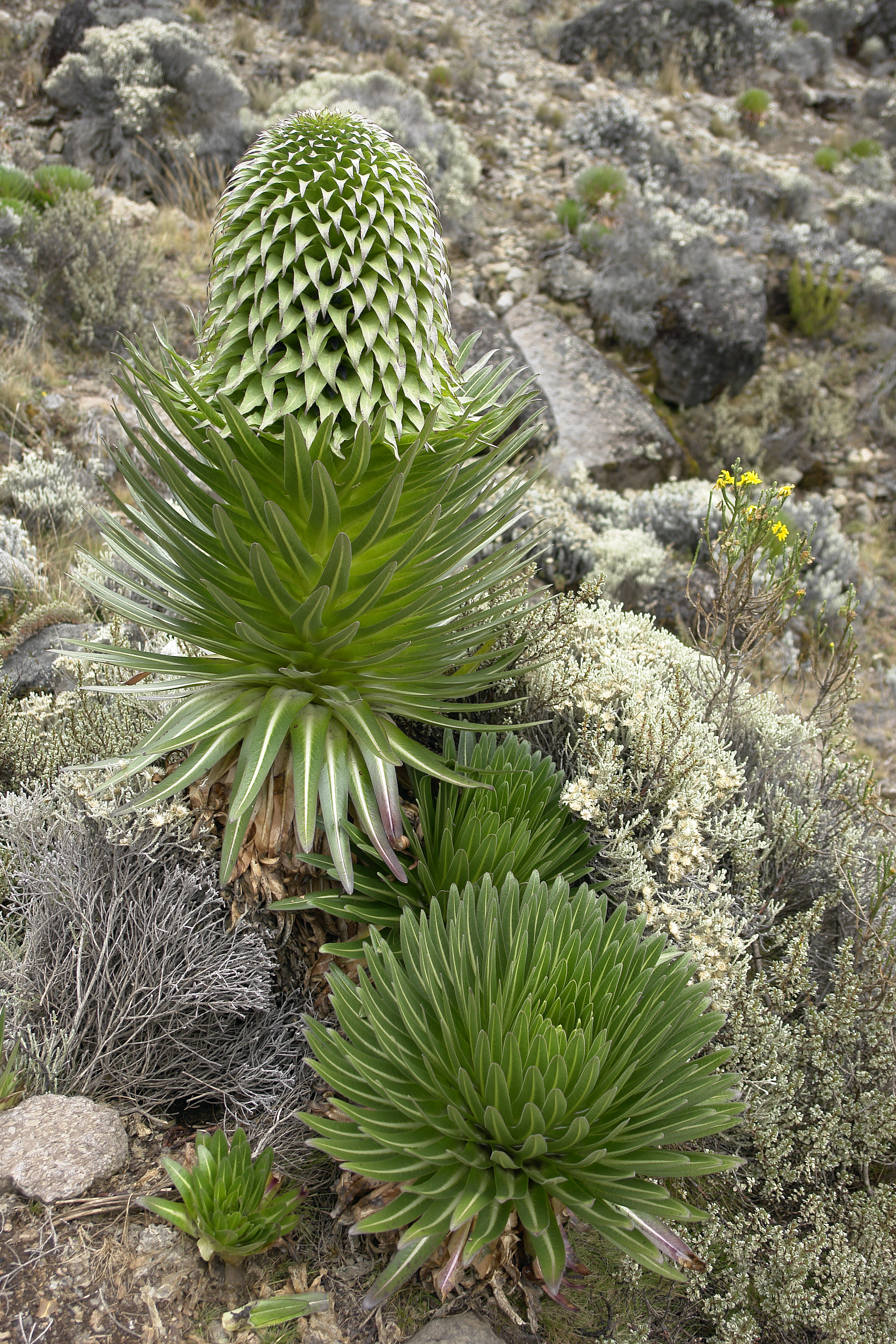 Riesenlobelien auf dem Kilimanjaro, Wachstum bis ca. 4.000m über NN